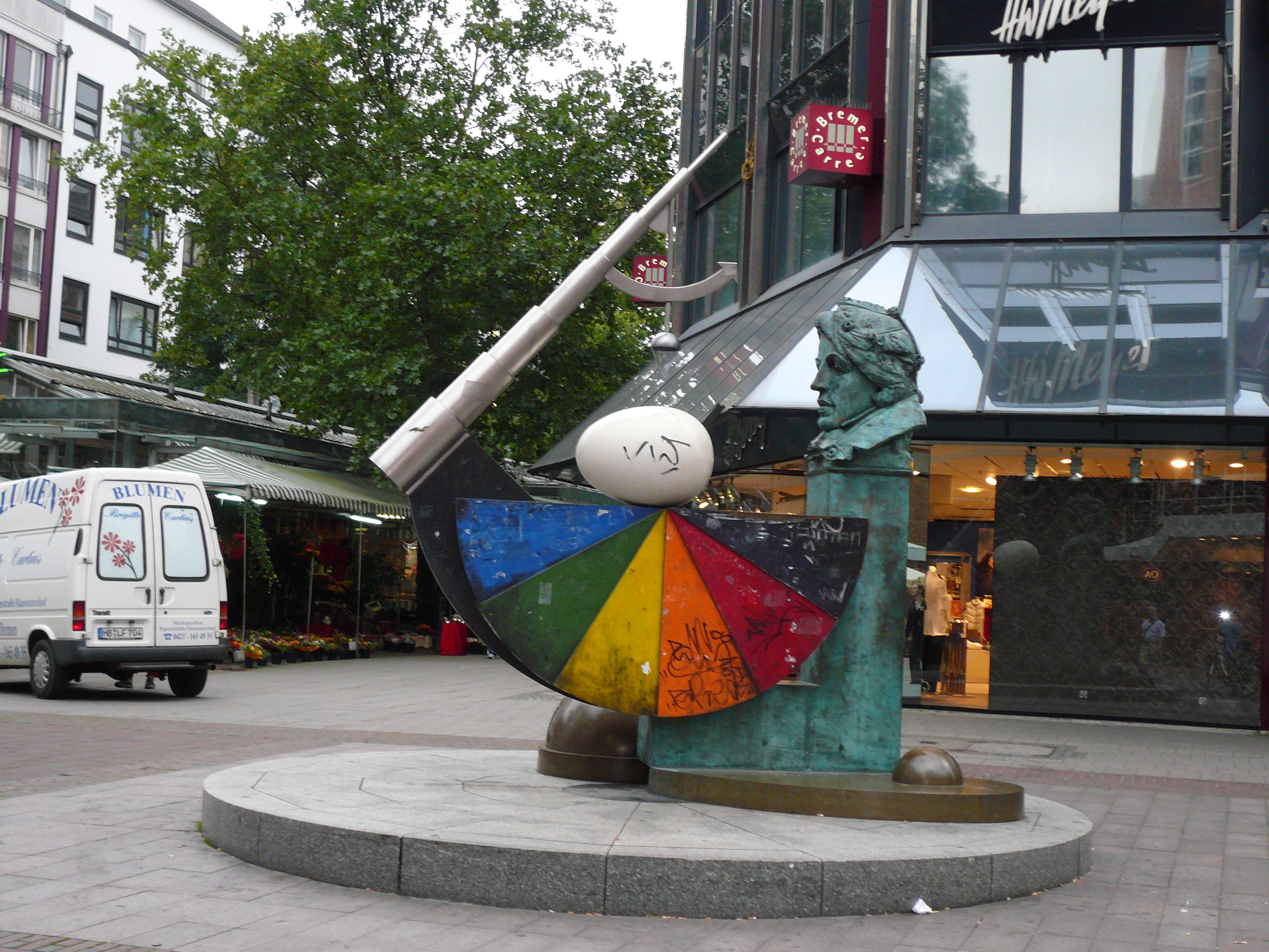 Das Besselei in Bremen